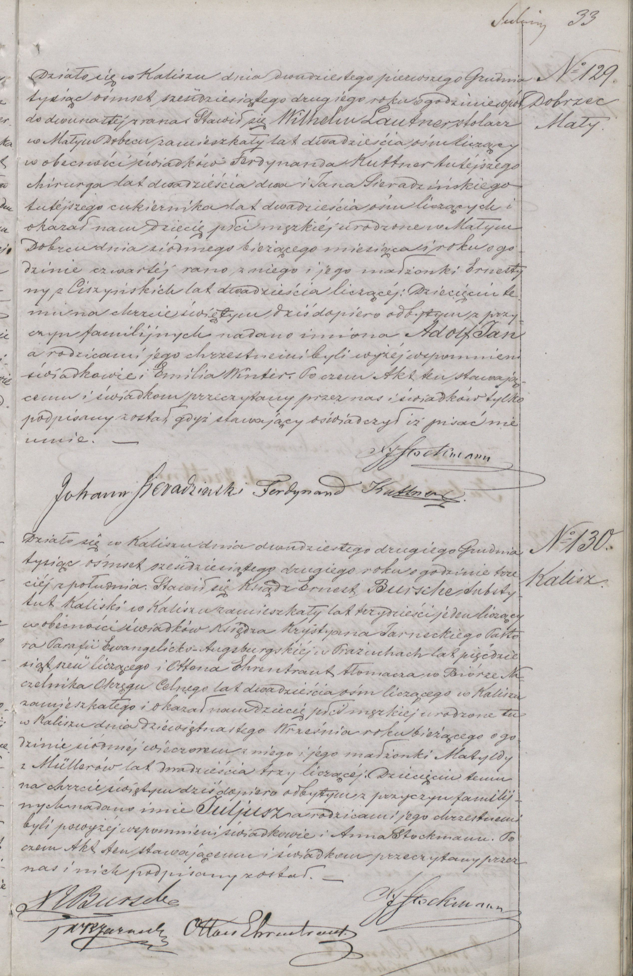 numer 130